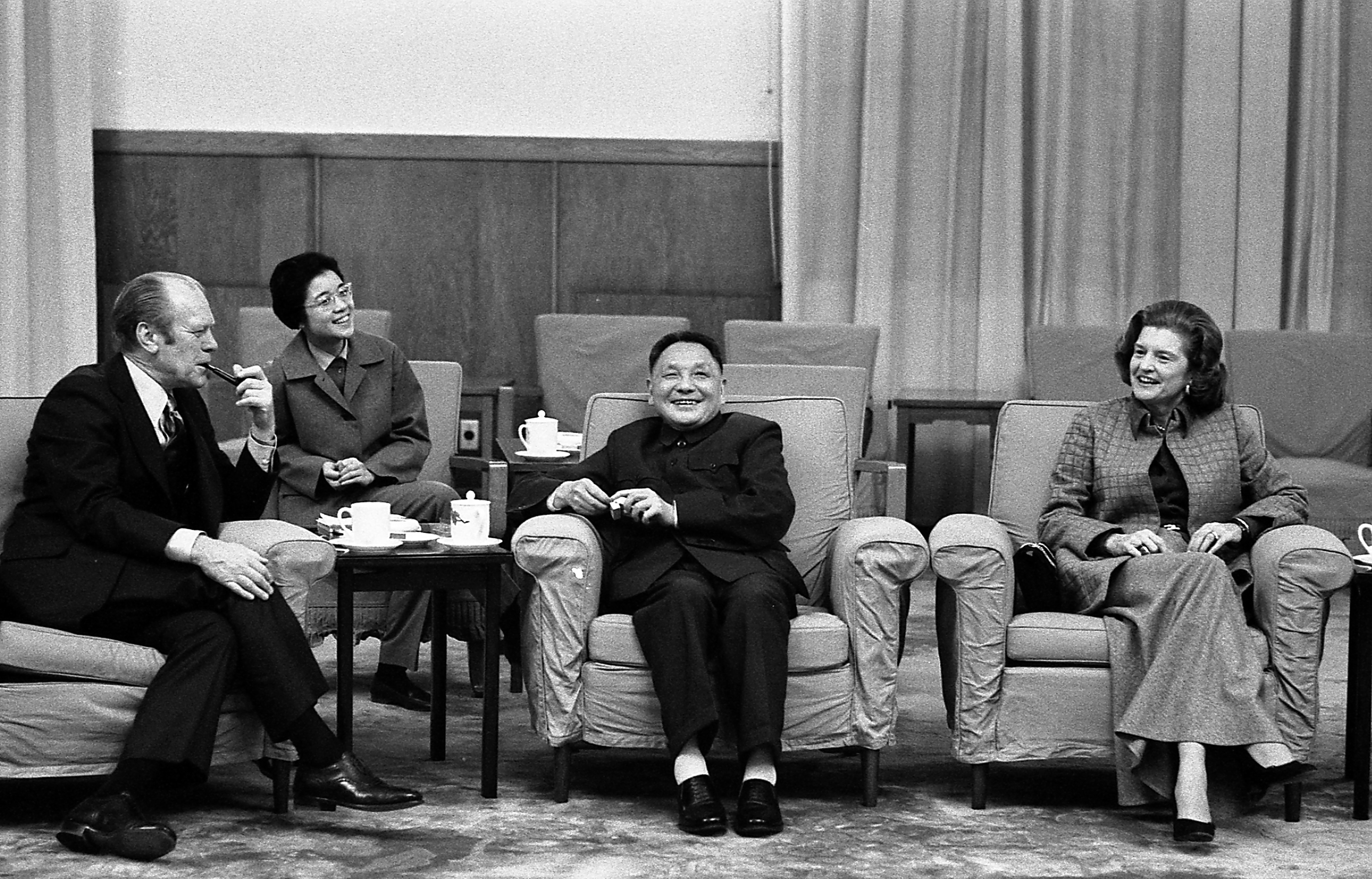 President and Mrs. Ford, Vice Premier Deng Xiao Ping, and Deng’s interpreter have a cordial chat during an informal meeting in Peking, China.